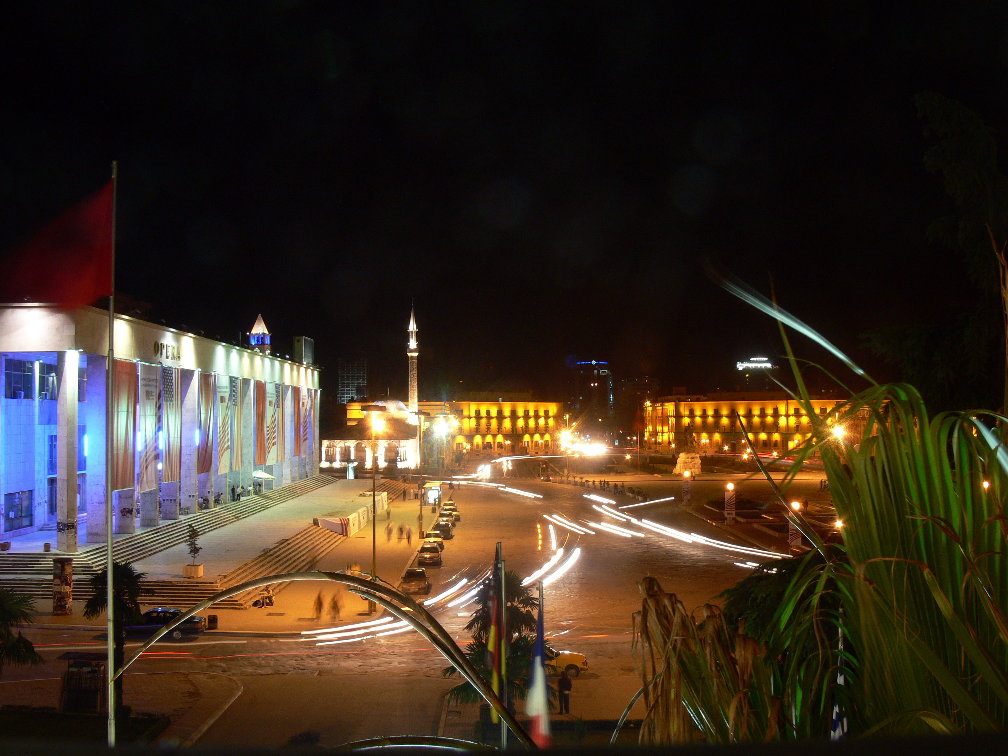 Tirana. Skanderbeg-Square (Sheshi Skenderbej) bei Nacht. Dekoration der Oper zum Bush-Besuch.